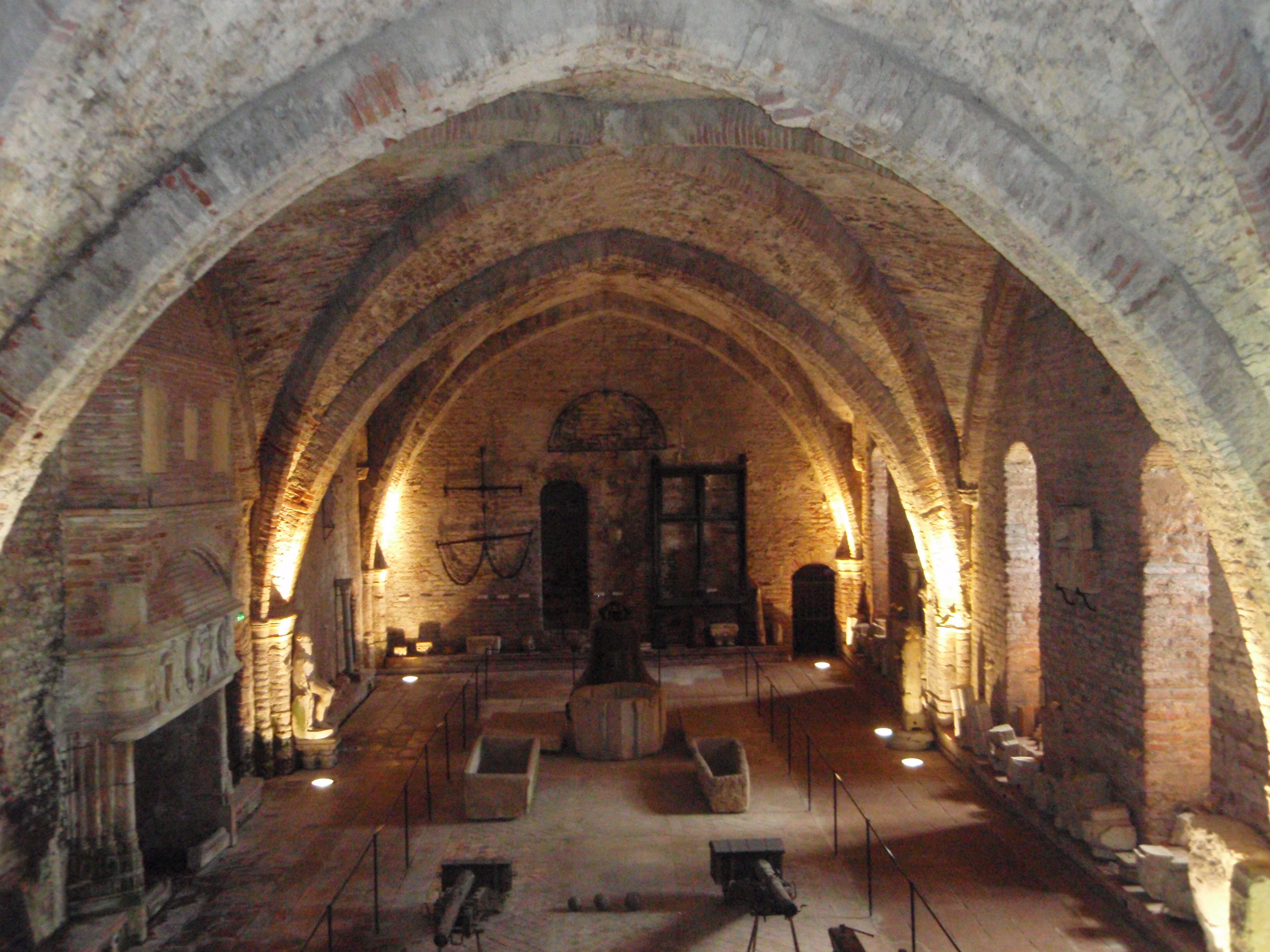 Montauban France, musée Ingres salle archéologie